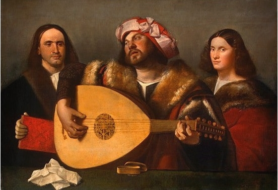 Concert